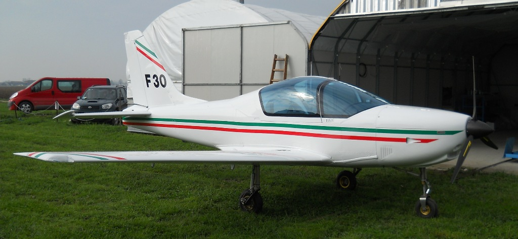 F30 sn 001 prodotto da Golden Avio